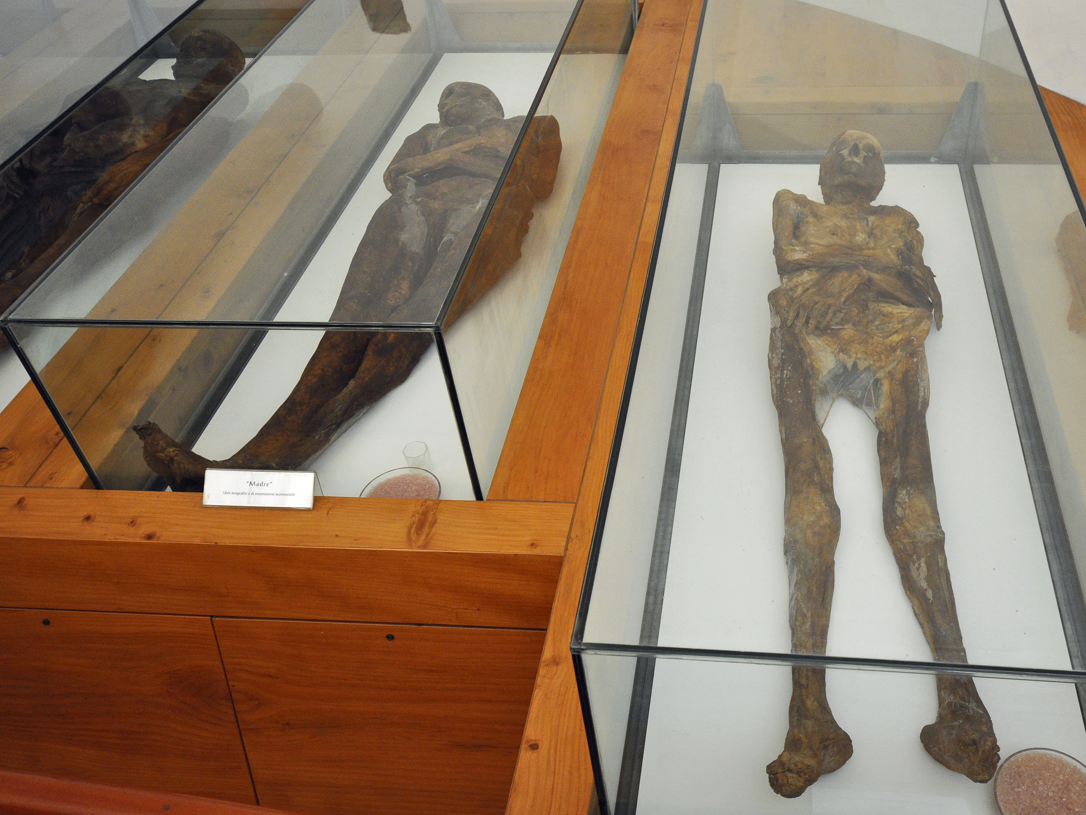 Momies de Venzone. Conservées dans la crypte de la chapelle Saint-Michel.